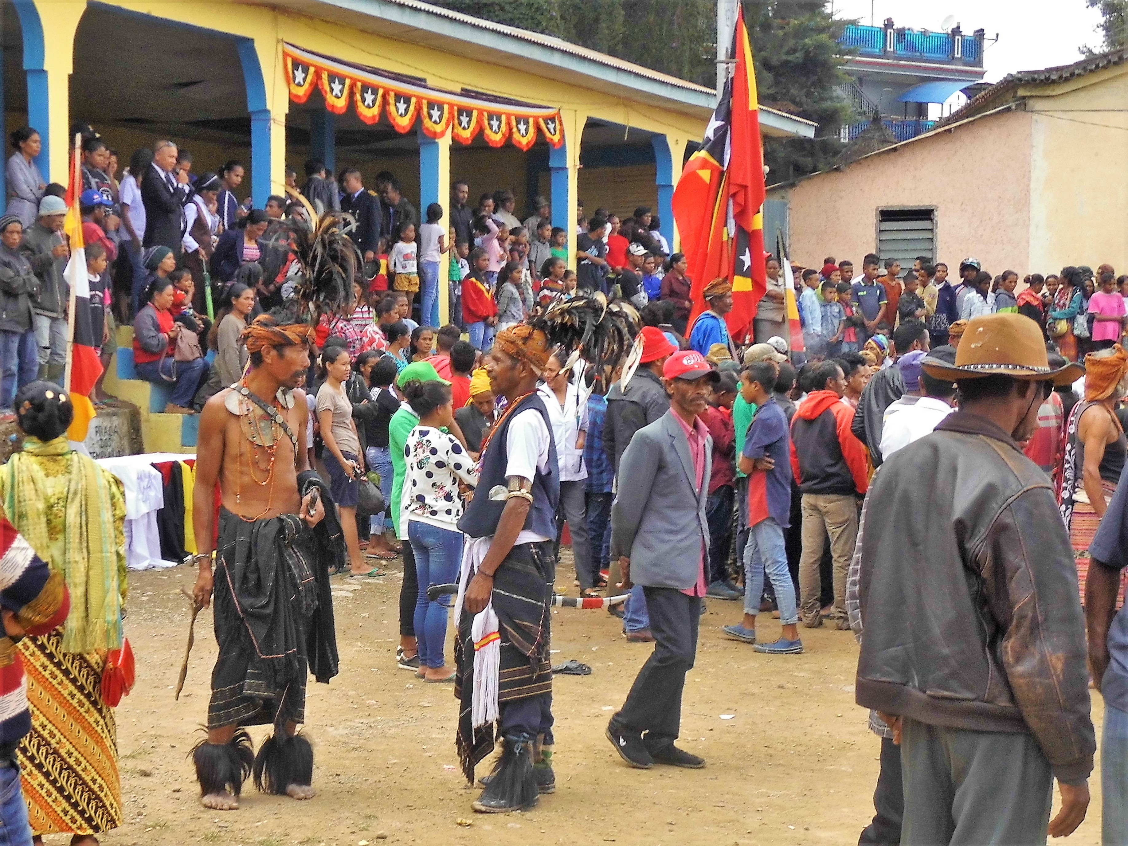 Maubisse